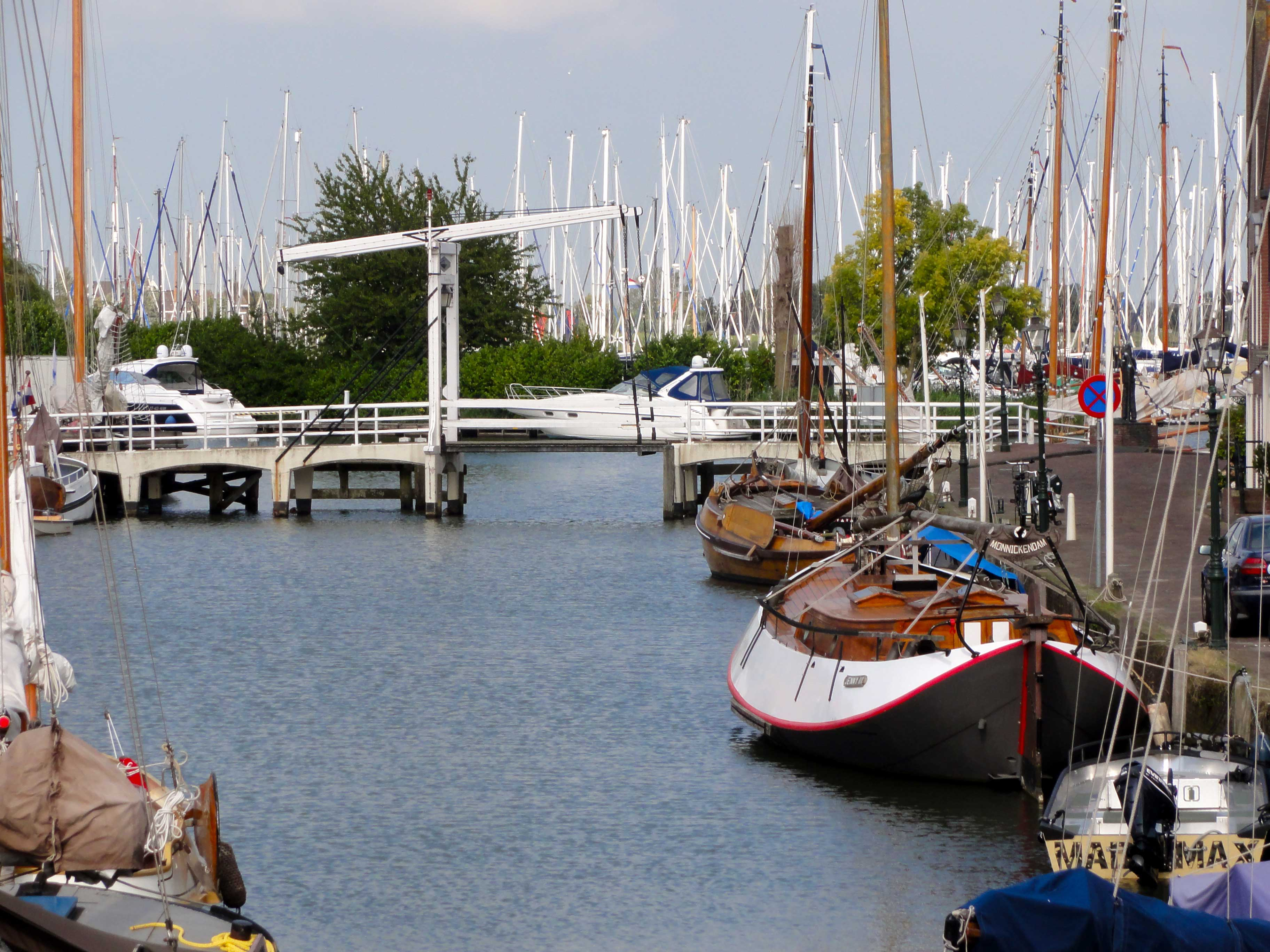 Langebrug Haven-Gooische Kaai Monnickendam